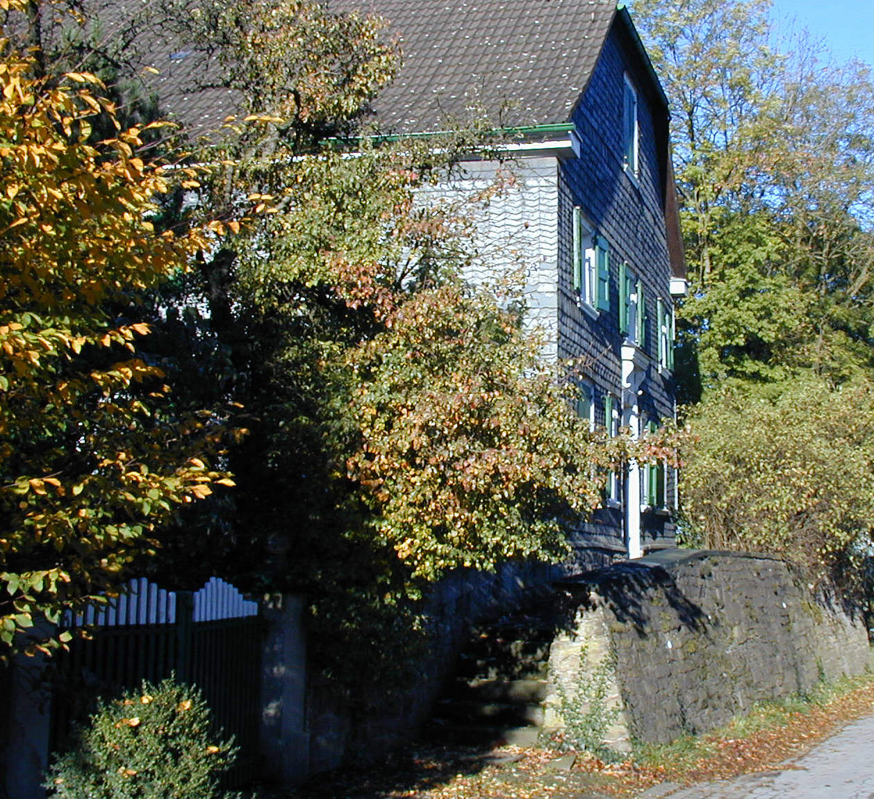 Gut Oberleveringhausen in Hiddinghausen (heute Sprockhövel), Geburtshaus von Mathilde Franziska Anneke This is a photograph of an architectural monument.